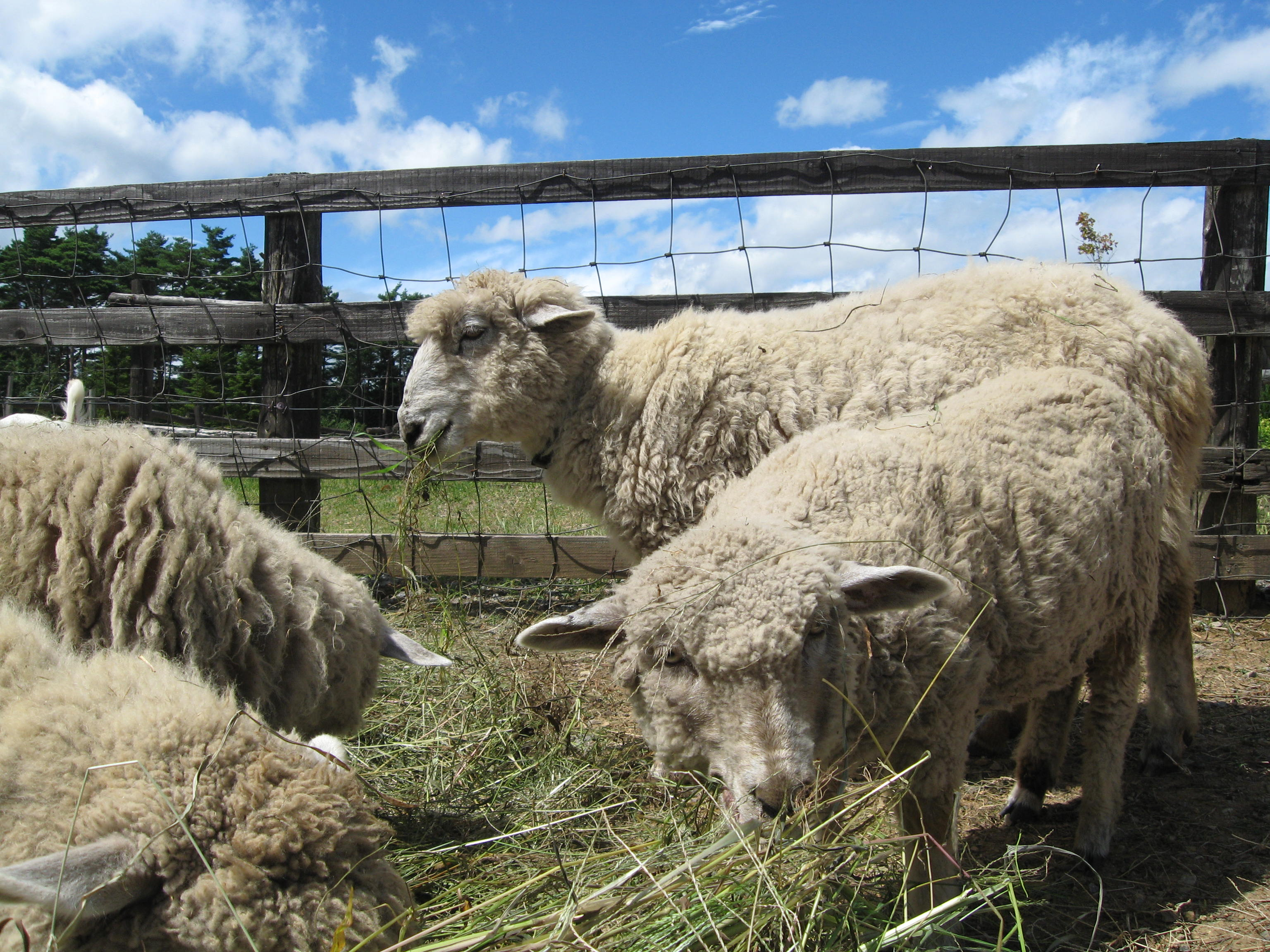 ひつじの放牧